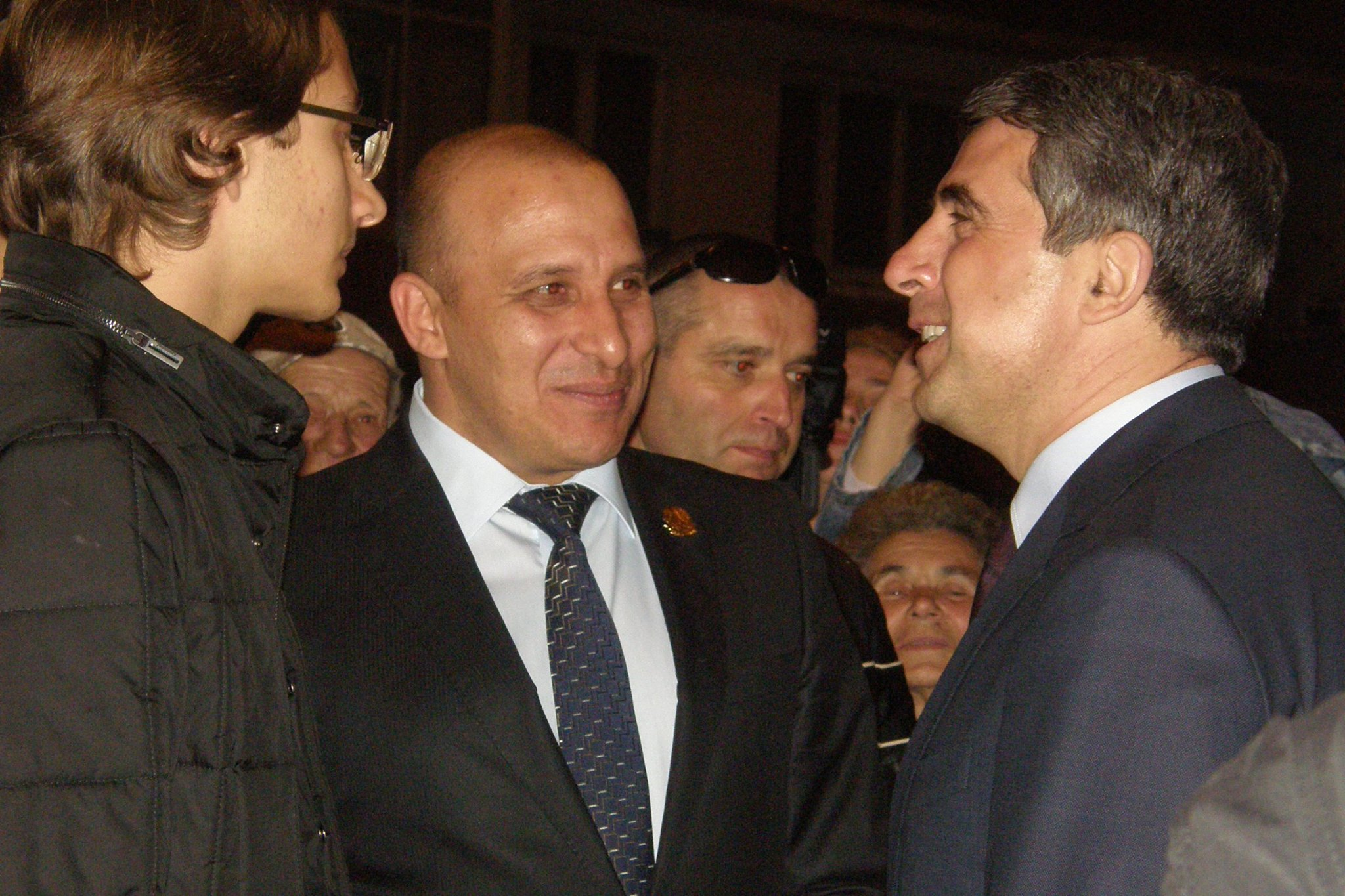 Инж. Никола Белишки със сина си Иван Белишки и президента на РБ Росен Плевненлиев